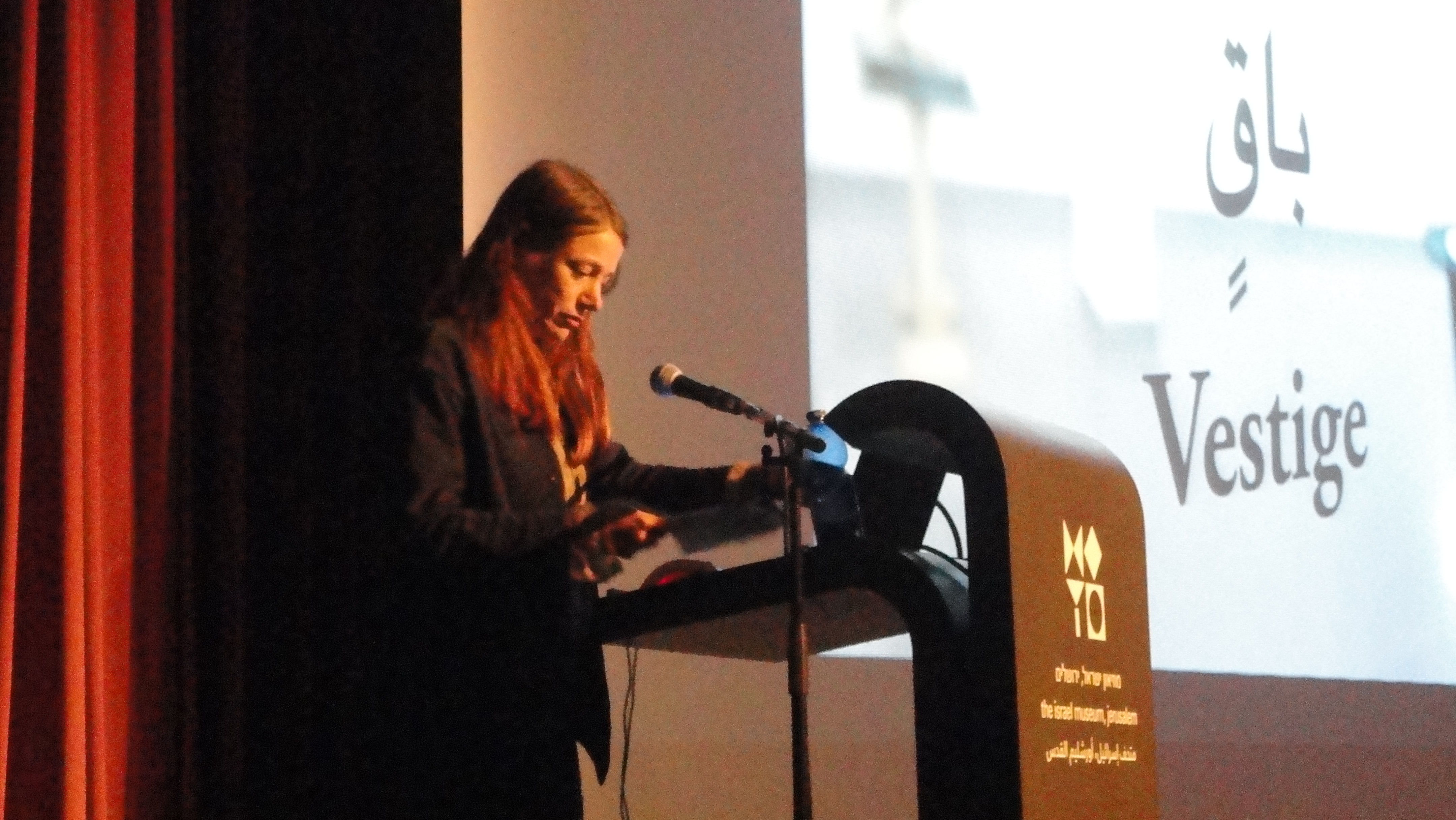 "Gideon Gechtman, 1942—2008", Symposium in The Israel Museum, Jerusalem, 5.3.2014